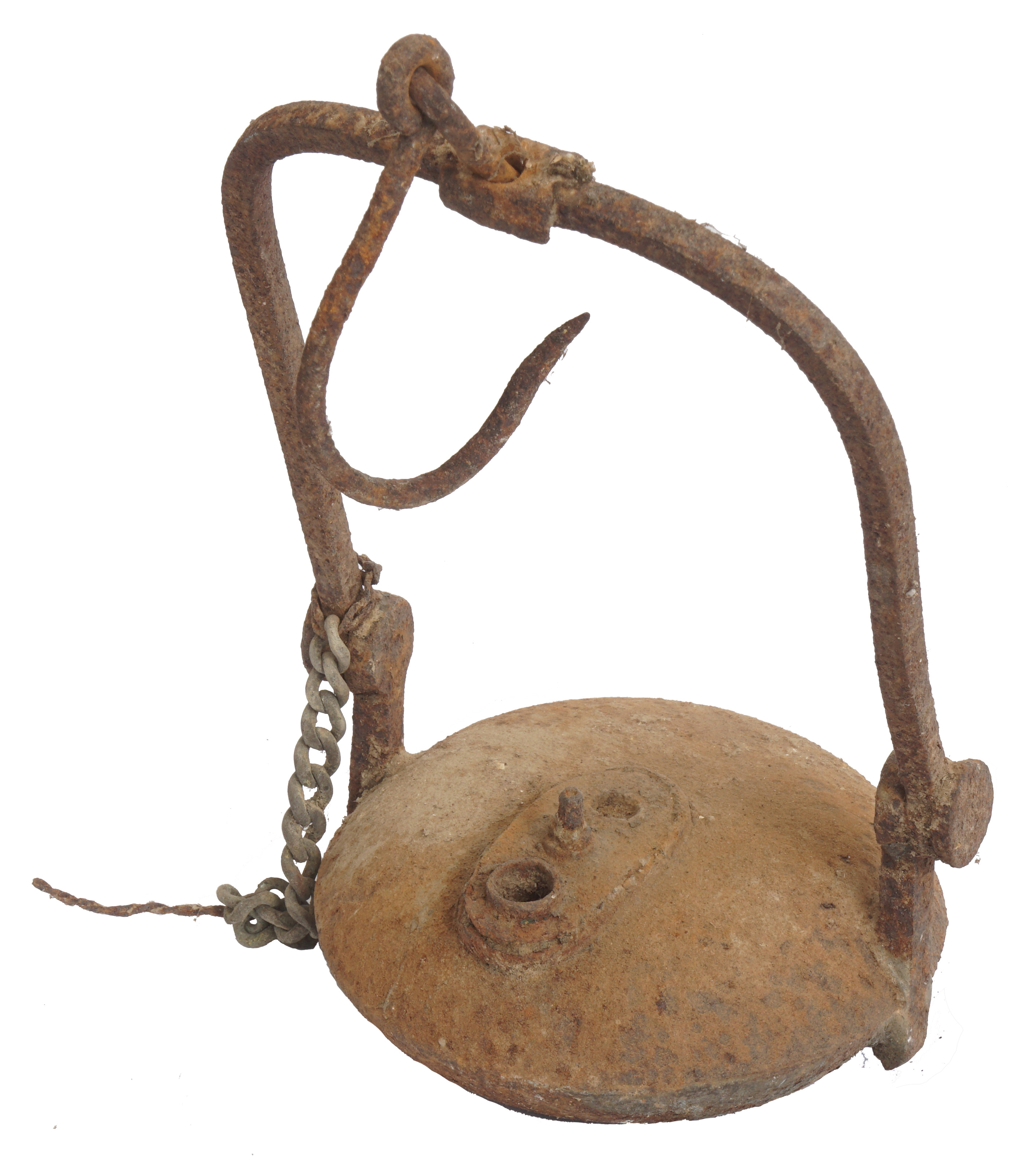 Lampe de mineur ayant travaillé aux houillères de Gémonval. (collection Denis Robert, famille Graisard)